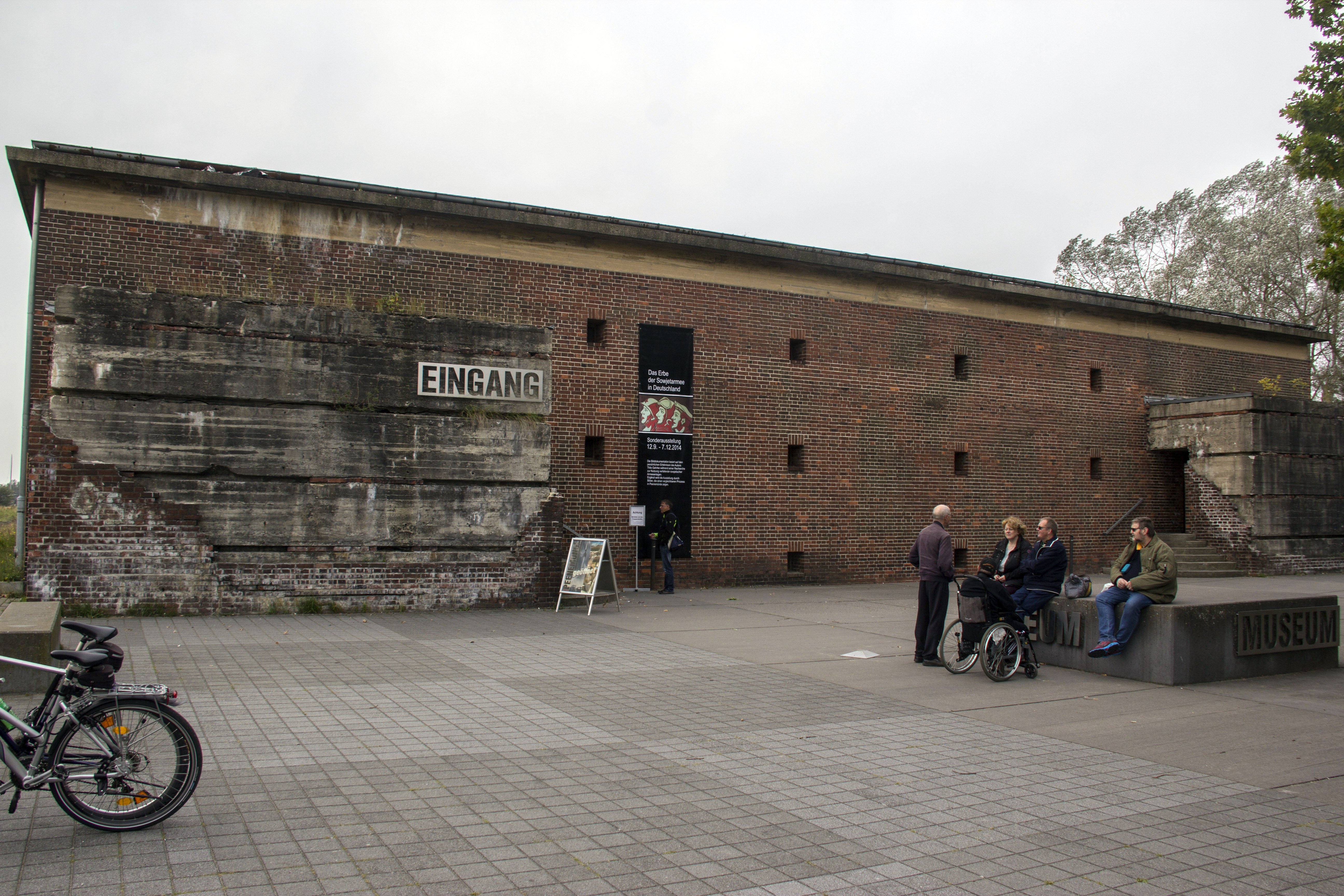 Peenemünde, Museum, Kraftwerk